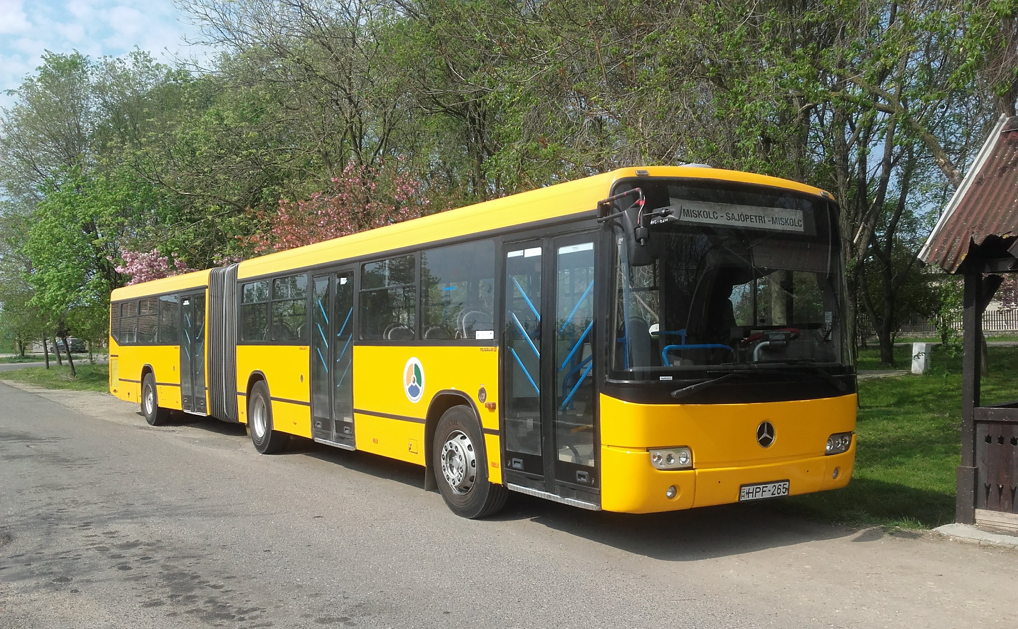 Az ÉMKK HPF-265 rendszámú Mercedes Conecto busza Sajópetriben, a 3735-ös helyközi járaton.